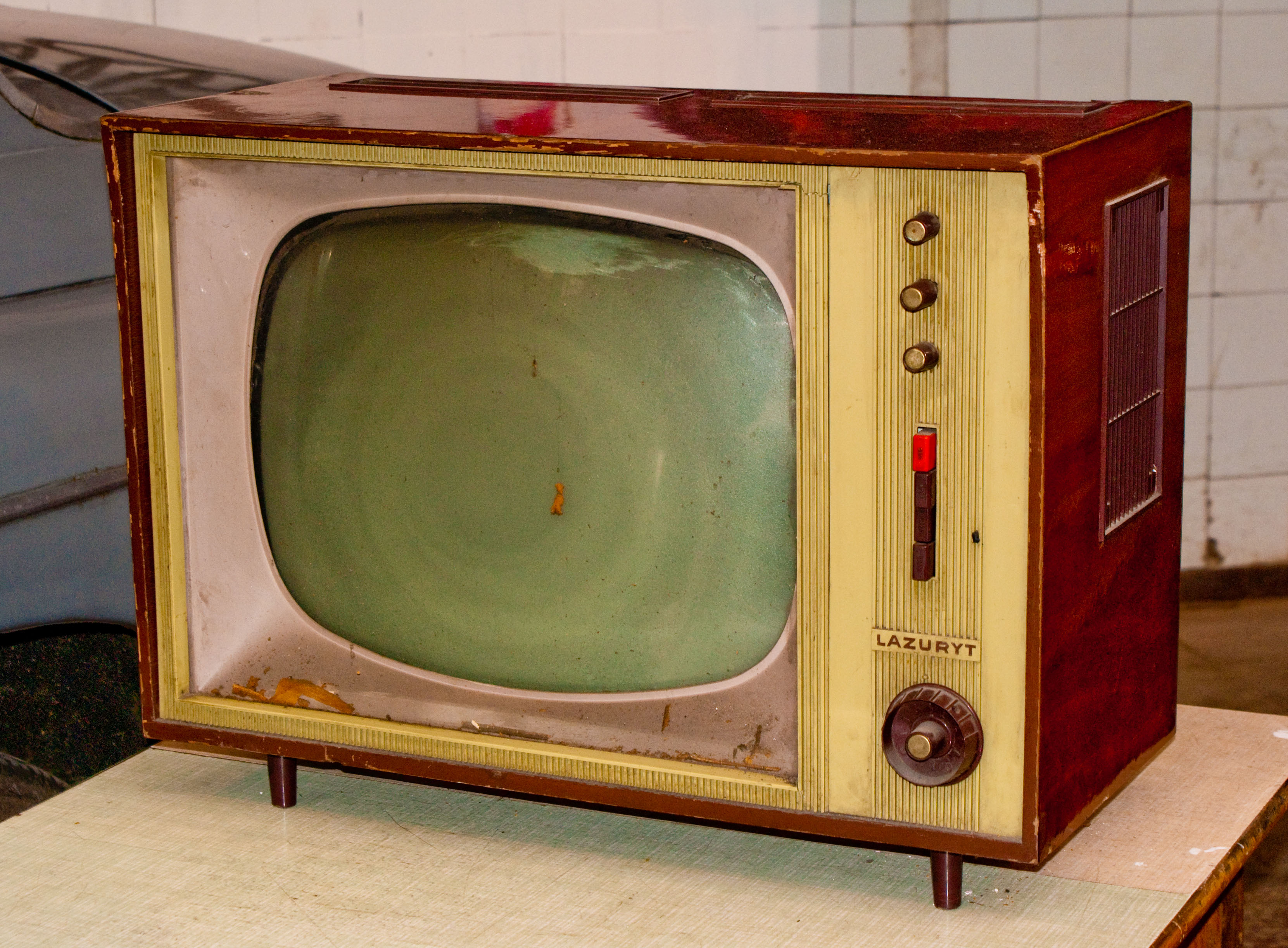 Telewizor CRT Lazuryt produkowany przez Warszawskie Zakłady Telewizyjne.Wystawa Prywatnego Muzeum Motoryzacji i Techniki w wytwórni Wódek Koneser.